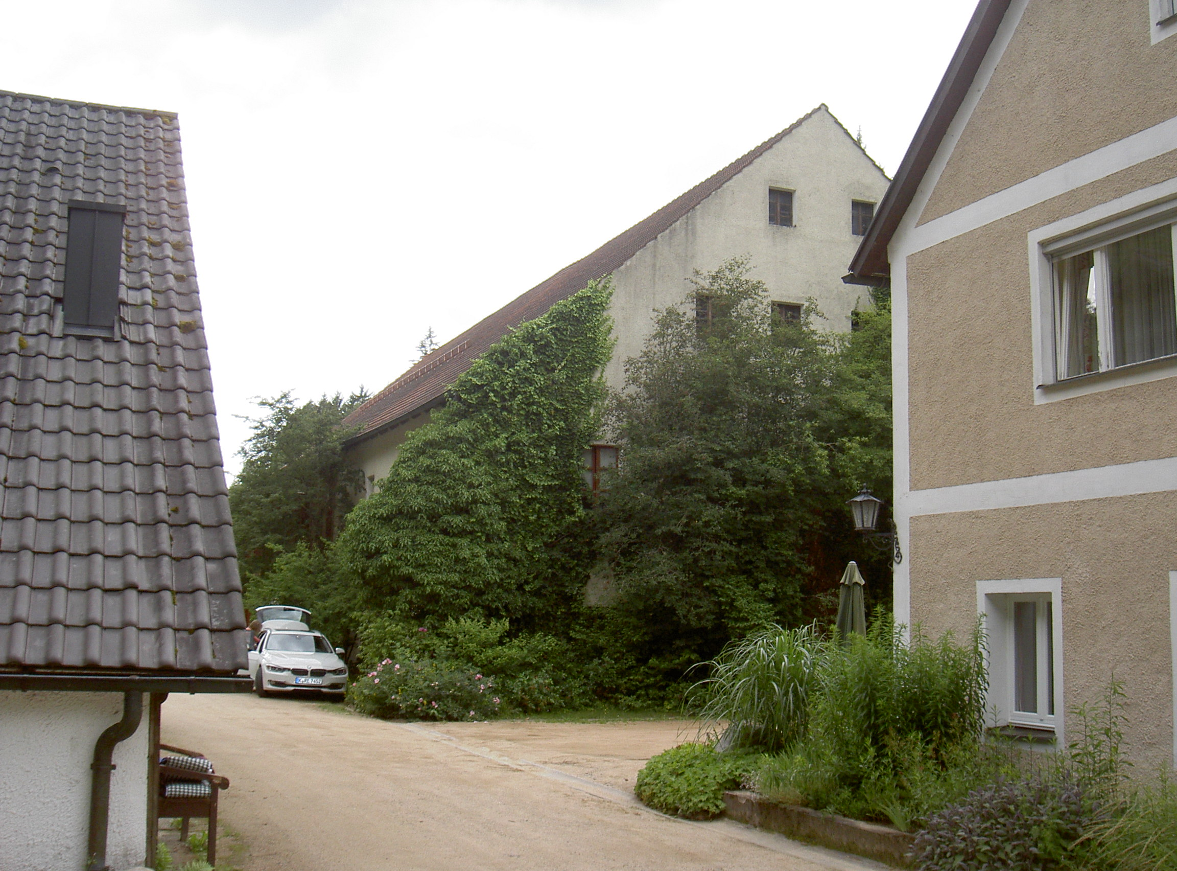 Glasschleife Untermurnthal